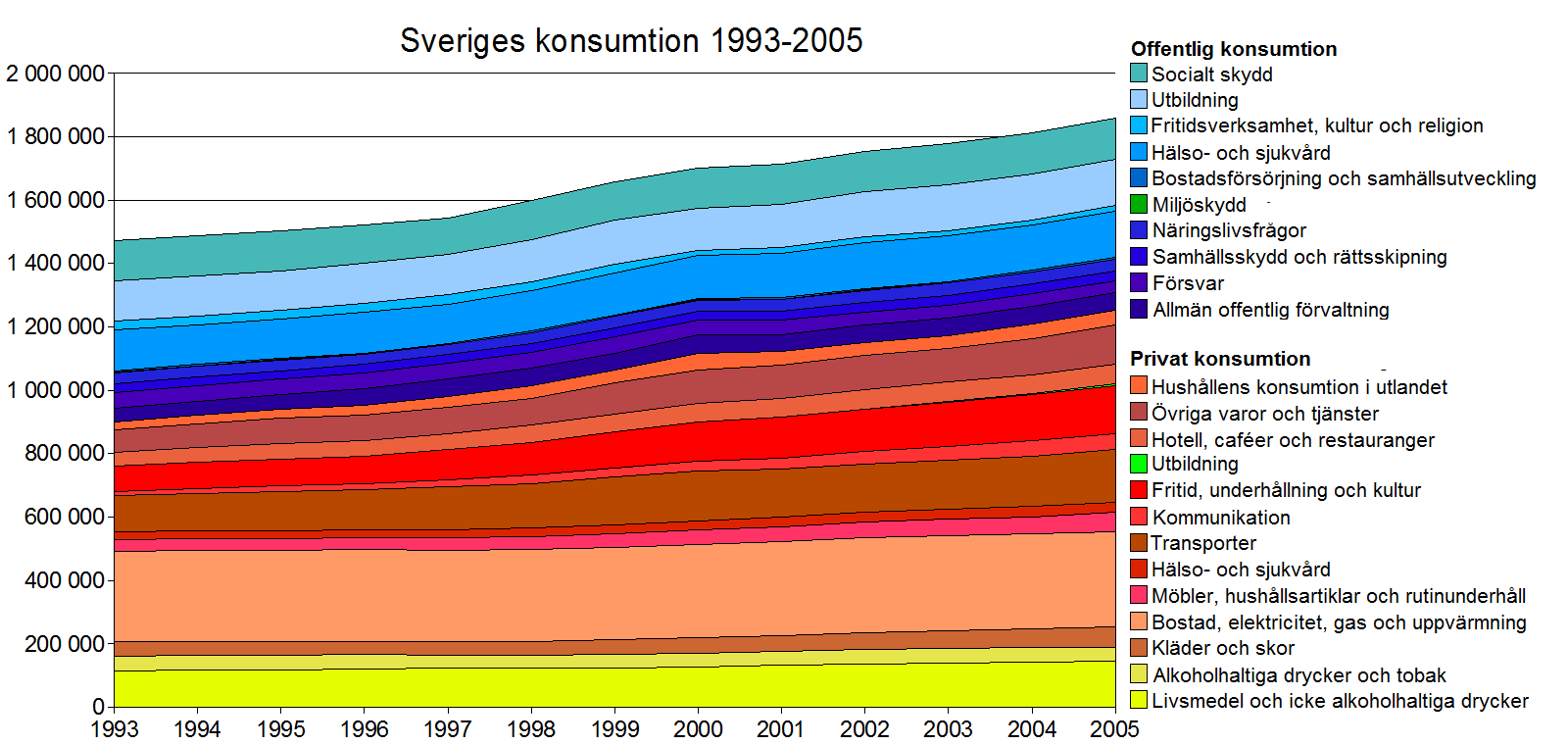 Sveriges konsumtion fördelade efter ändamål 1993-2005. Fasta priser, år 2000 som referensår. Miljoner kronor. Källa: Statistiska Centralbyrån Nationalräkenskaper. Data hämtad 28 augusti 2008.